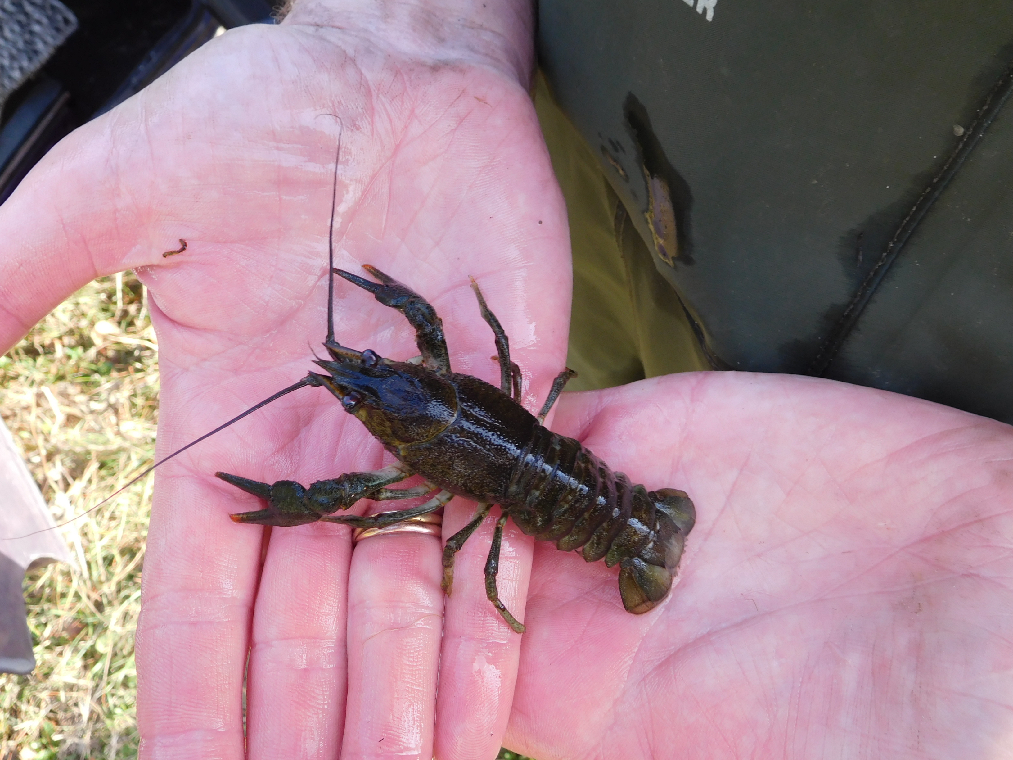 December 2017 Odessa